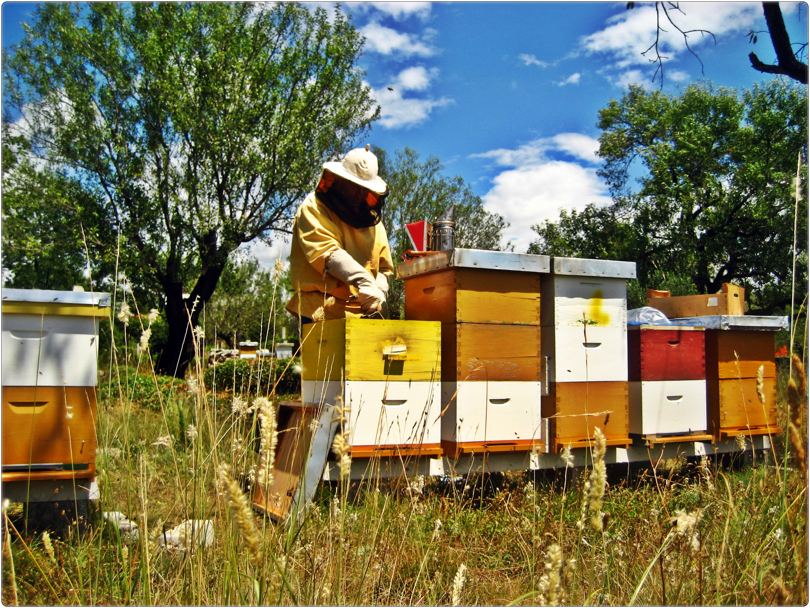 Pregled stanja pčelinjih društava